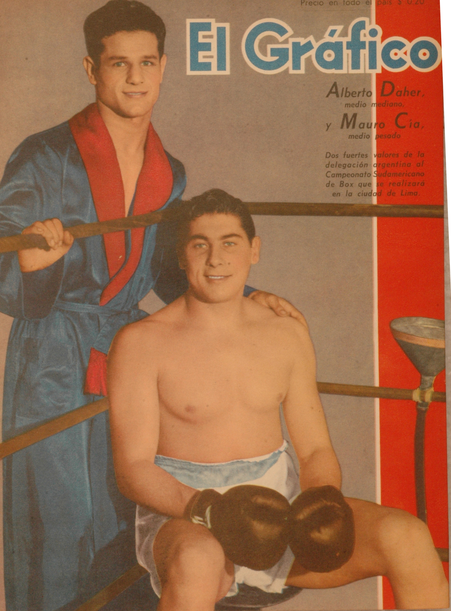 El Grafico del 18 de Febrero de 1944. Edicion 1284